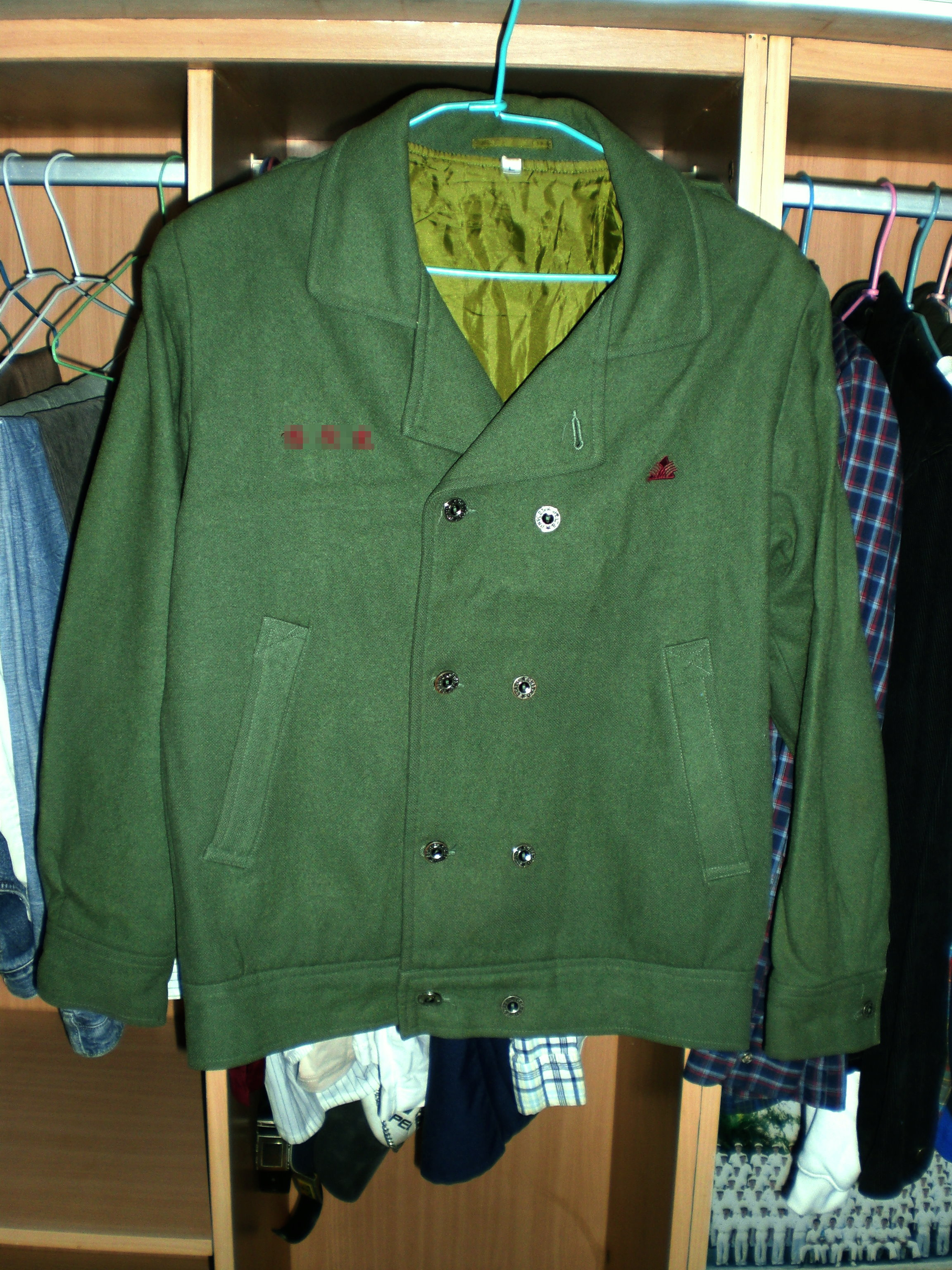 1999年臺北市立松山高級中學制服外套，近似當時中華人民共和國人民警察制服外套，被當時該校學生戲稱「公安裝」。左胸繡校徽，右胸繡學生姓名。